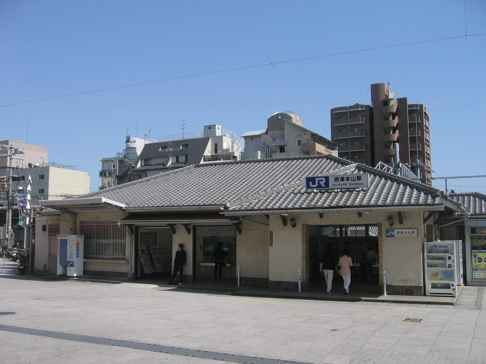 摂津本山駅北口